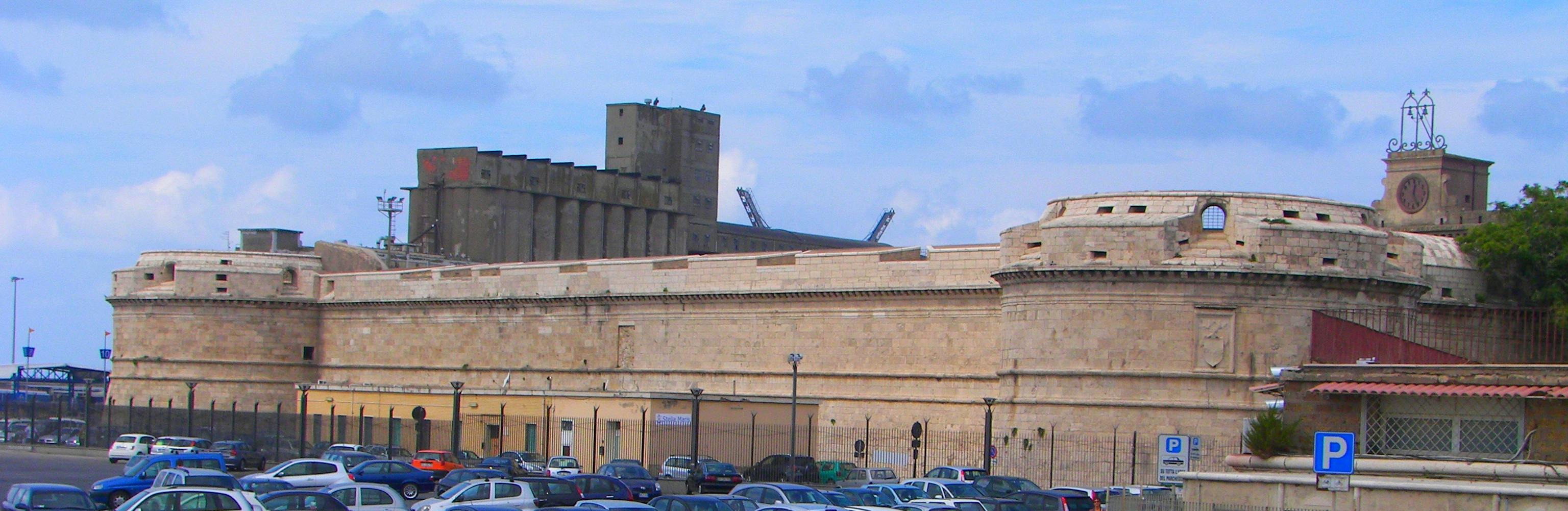 Die Festung Forte Michelangelo ist das wuchtige Wahrzeichen der Stadt, direkt am Hafen